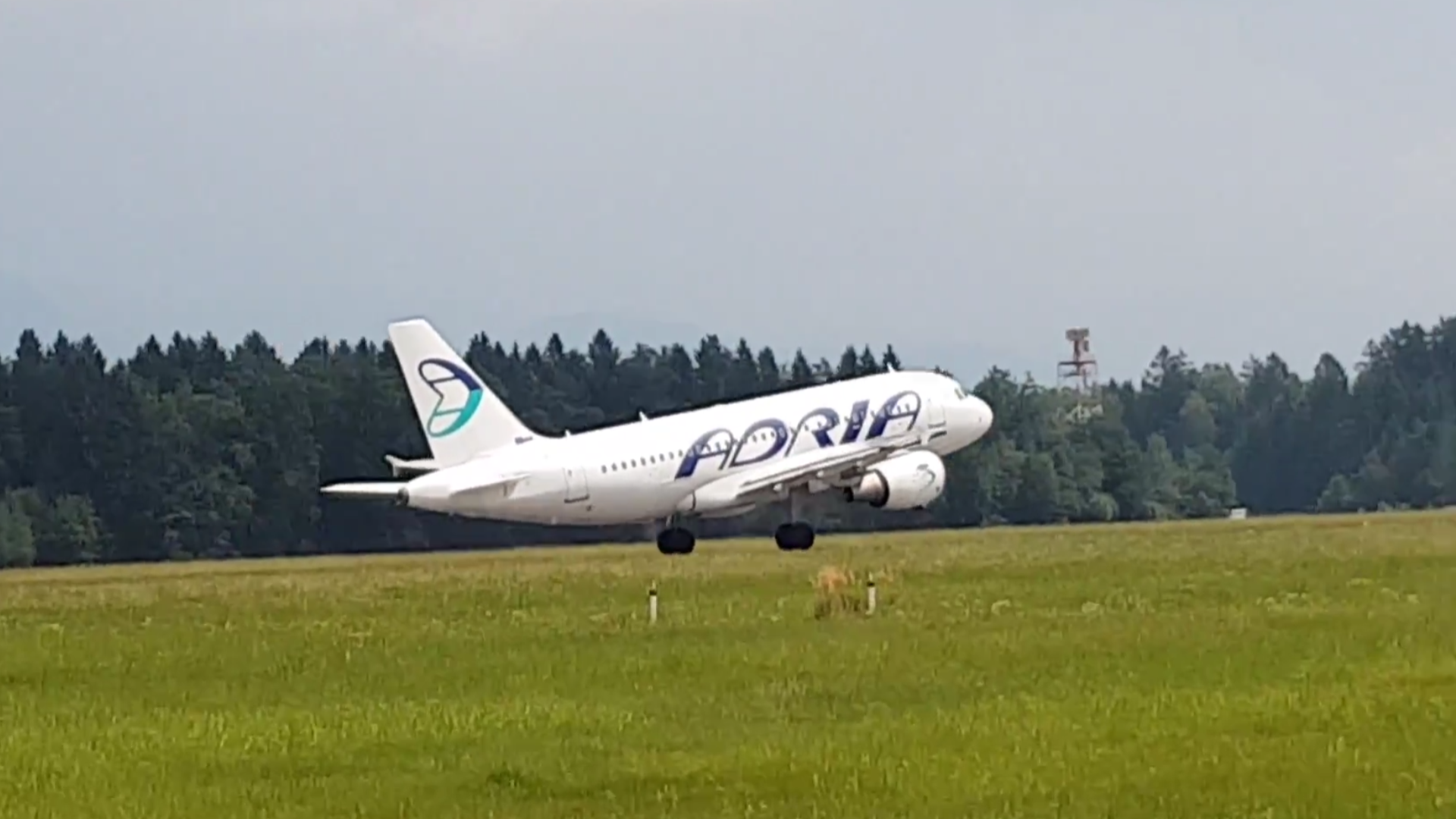 Airbus A319 pri vzletu z letališča